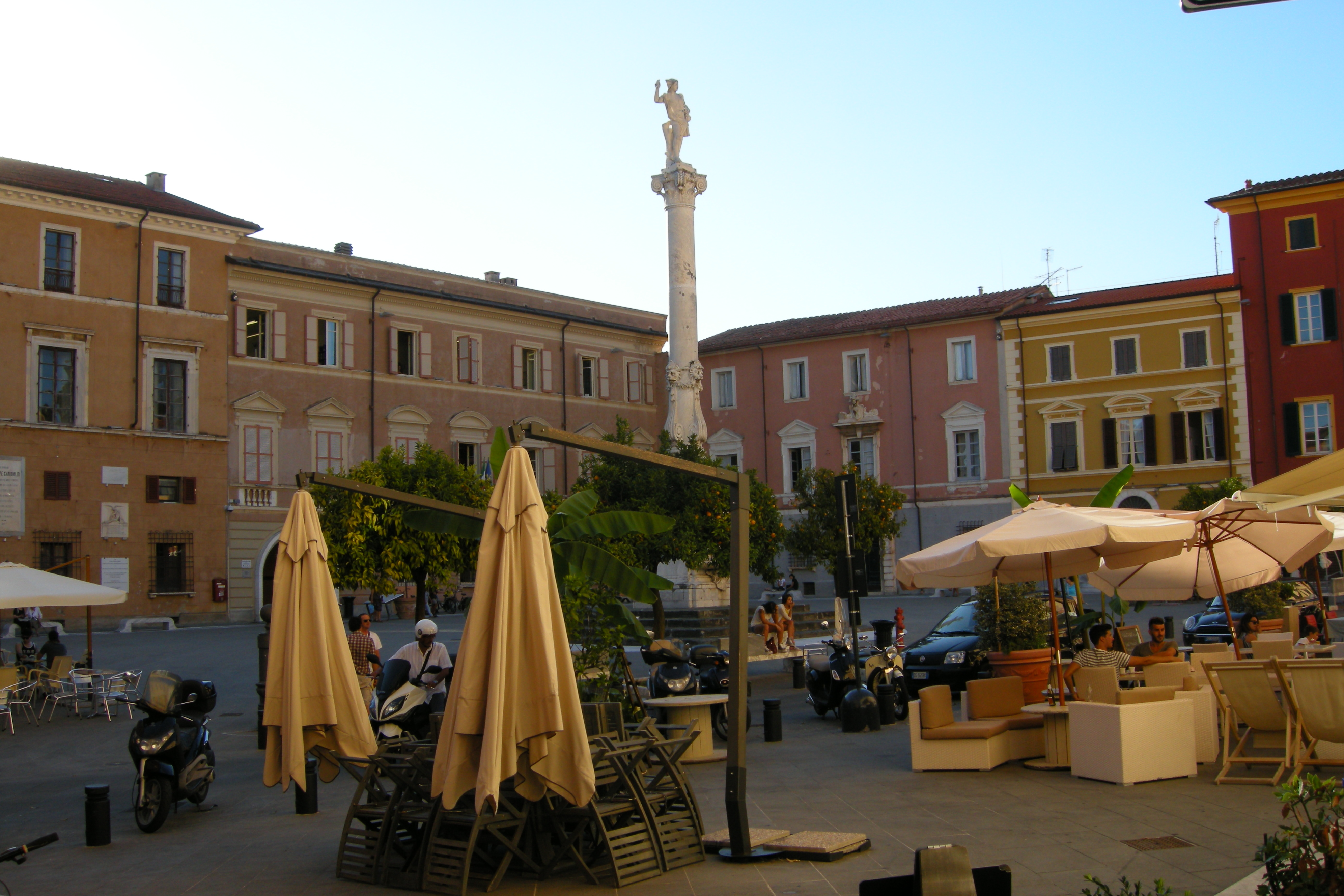 Piazza Mercurio, Massa, Italia